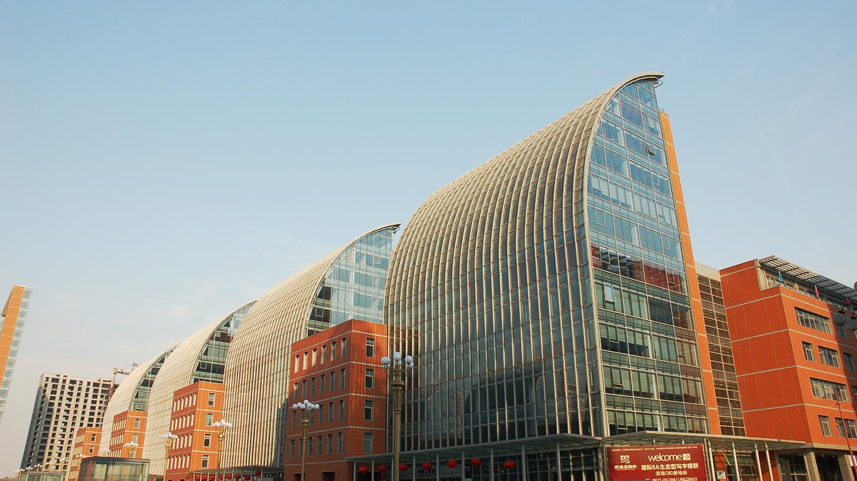 天津滨海新区泰达金融街